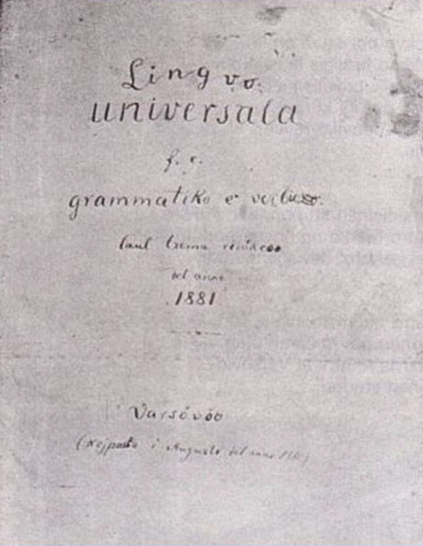 Gramatiko de Lingvo Universala, la stadio de Esperanto en 1881.